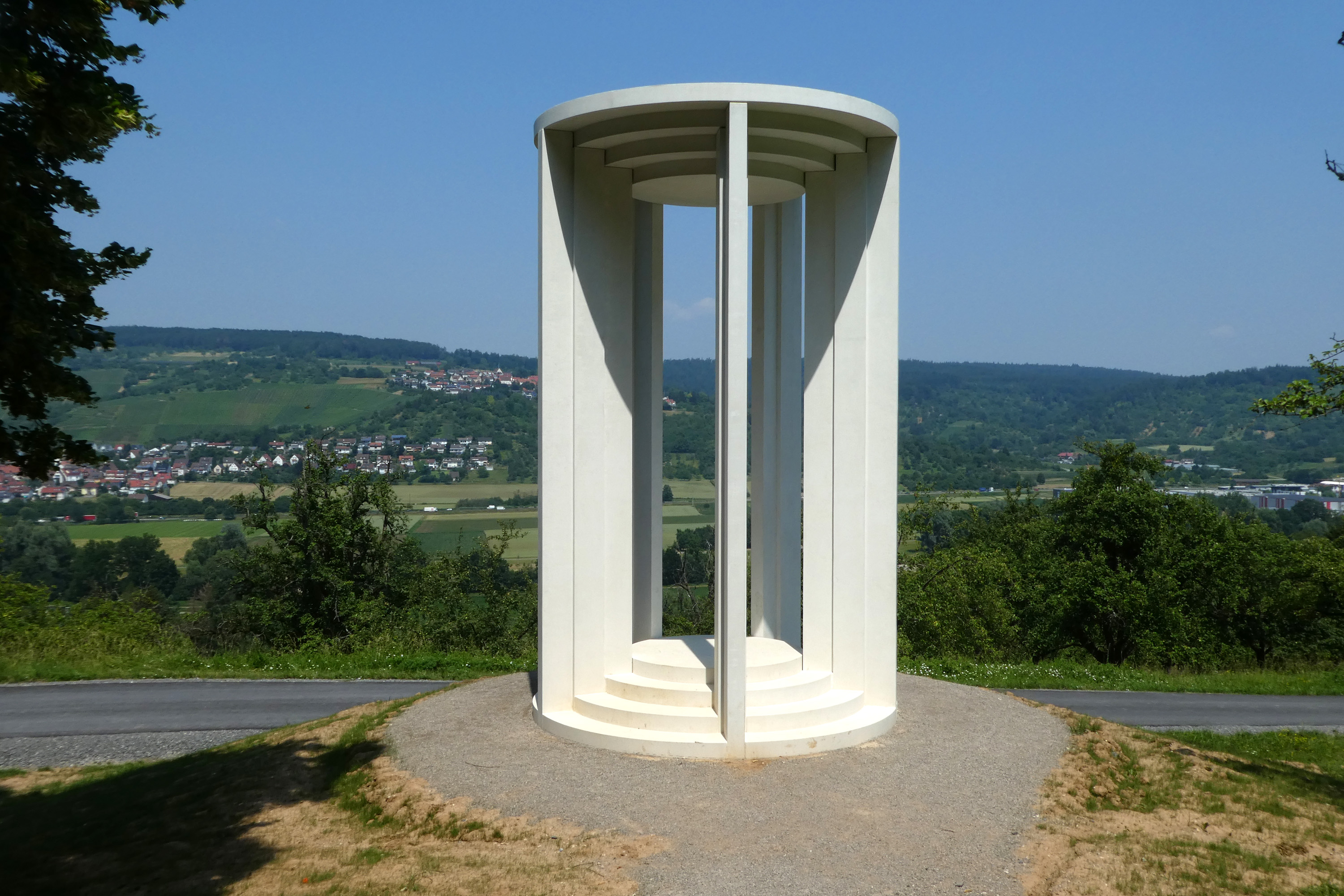 Winterbach - "Monopteros". Das Bauwerk entstand als Station 9 der "16 Stationen" der Remstal-Gartenschau 2019.